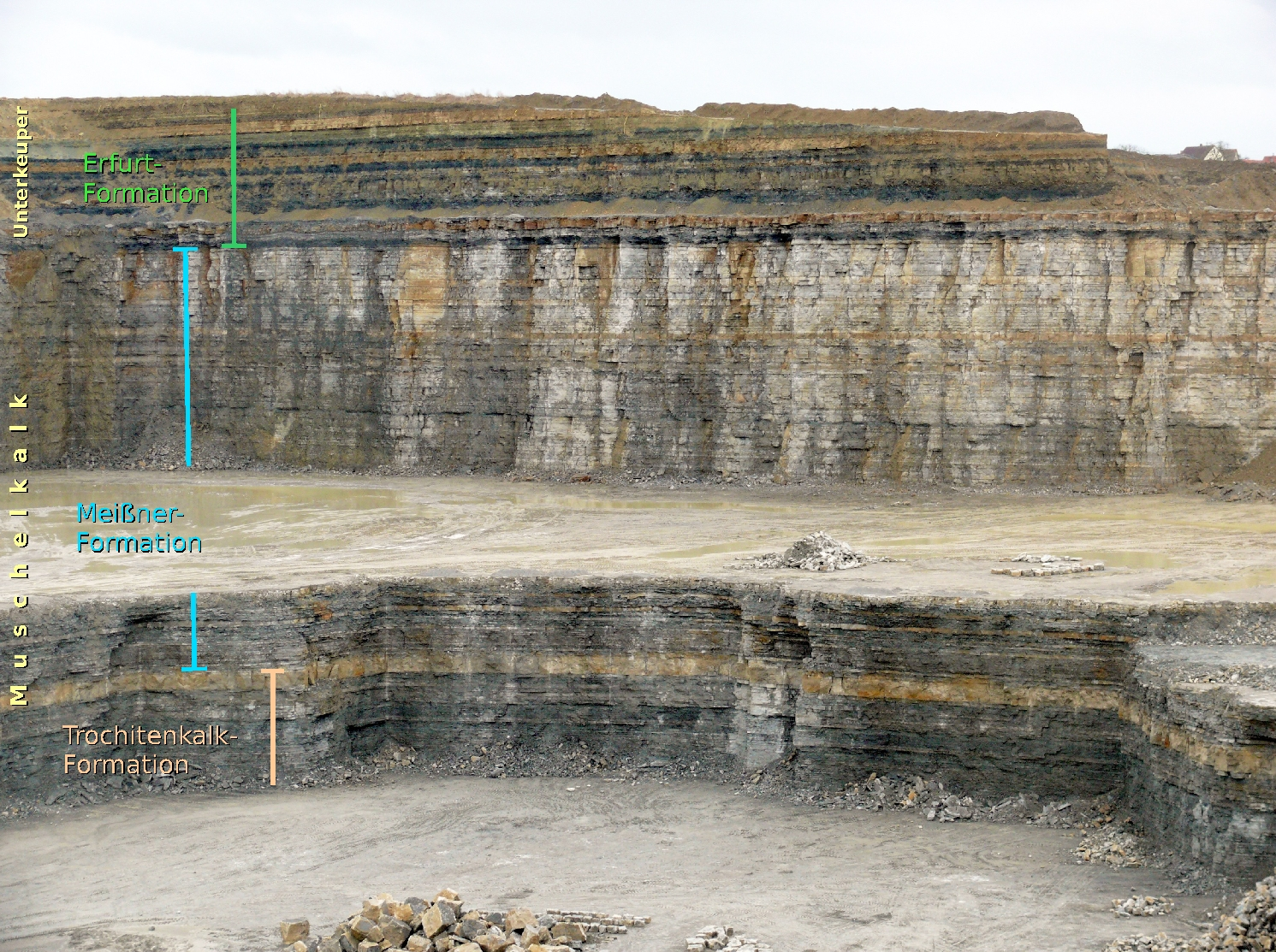 Unterkeuper:-Erfurt-FormationMuschelkalk:-Meißner-Formation-Trochitenkalk-Formation (Crailsheim-Subformation, mit der abschließenden Spiriferinabank)Steinbruch bei Crailsheim